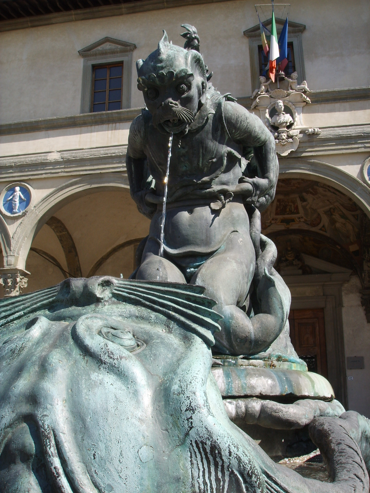 Prima fontana dei mostri marini